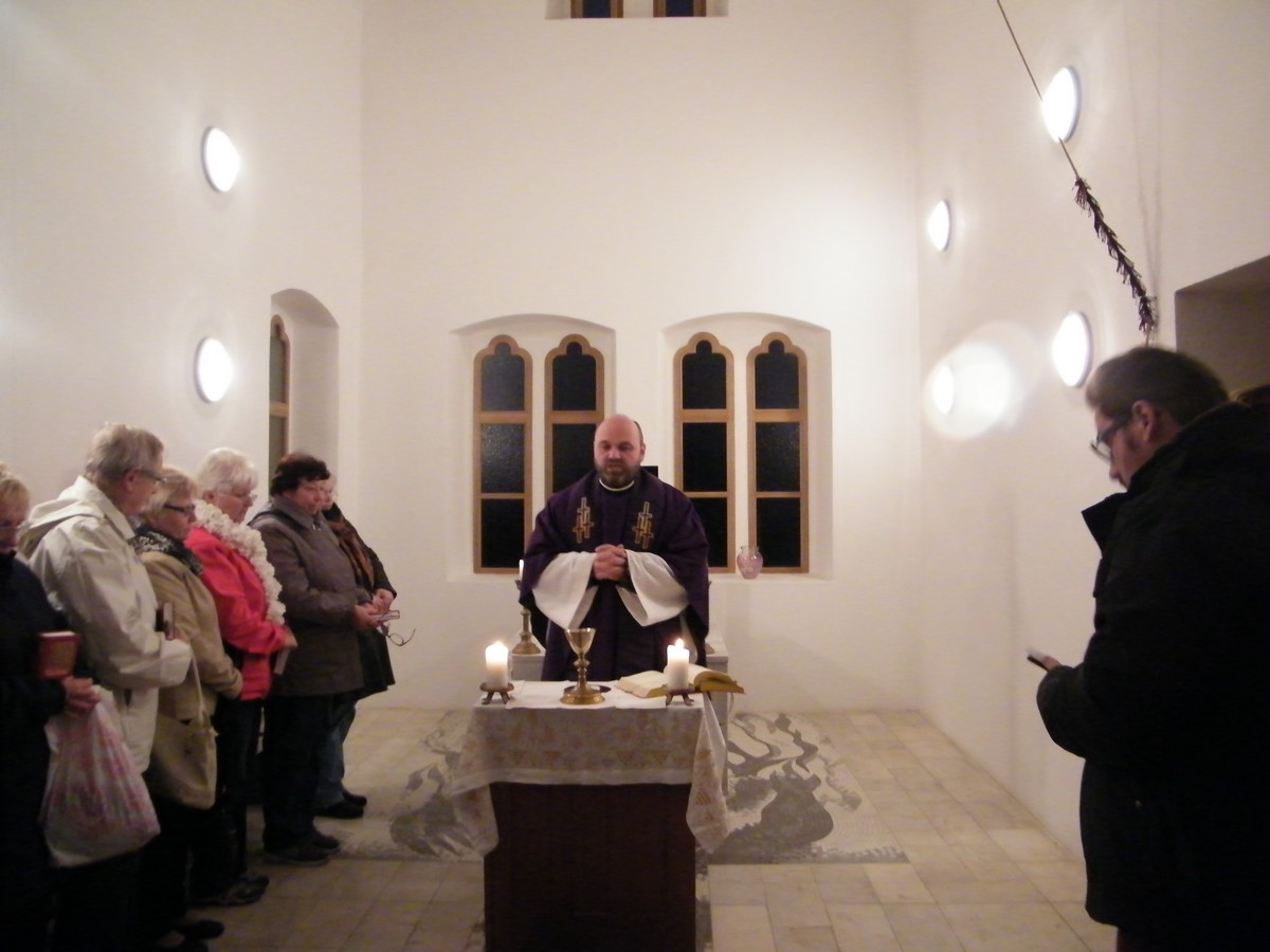 Hřbitovní kostel Nanebevstoupení Páně v Mikulášovicích, 2. listopad 2016, mše svatá